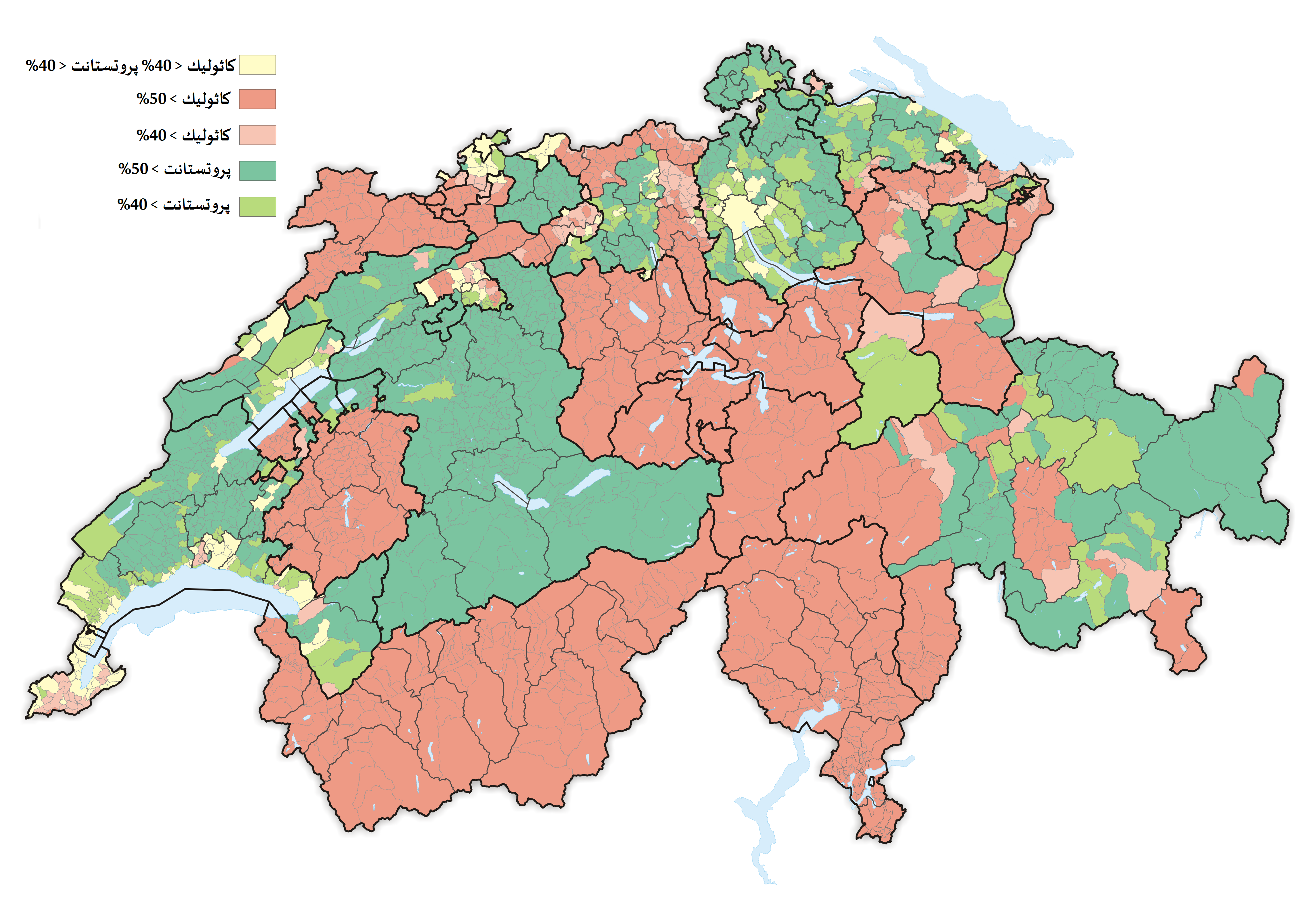 توزُّع الطائفتين الكاثوليكيَّة والپروتستانتيَّة في سويسرا.